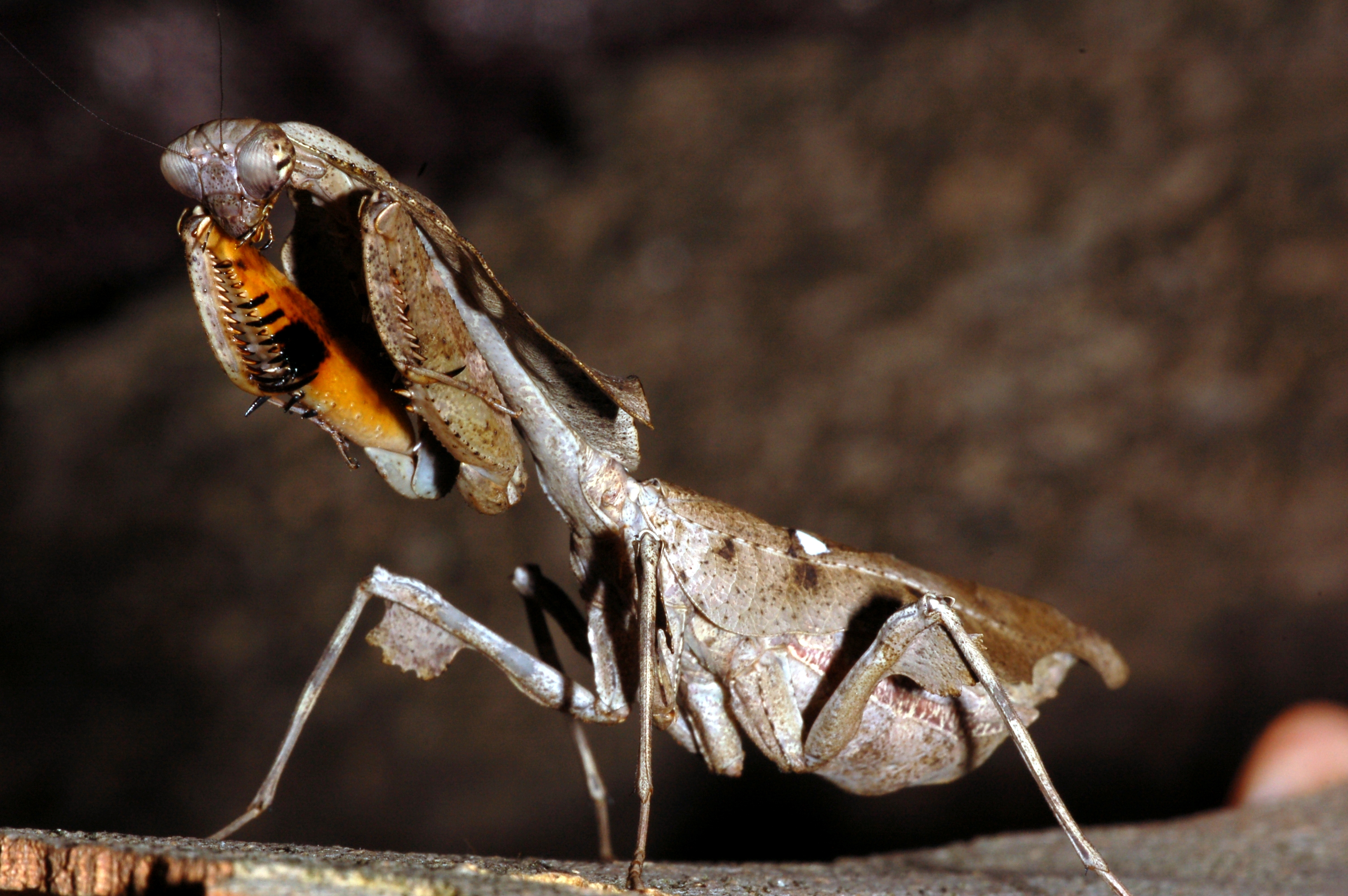 Weibliches Totes Blatt Deroplatys lobata (Mantidae) in Gefangenschaft, Museum Wiesbaden, Deutschland